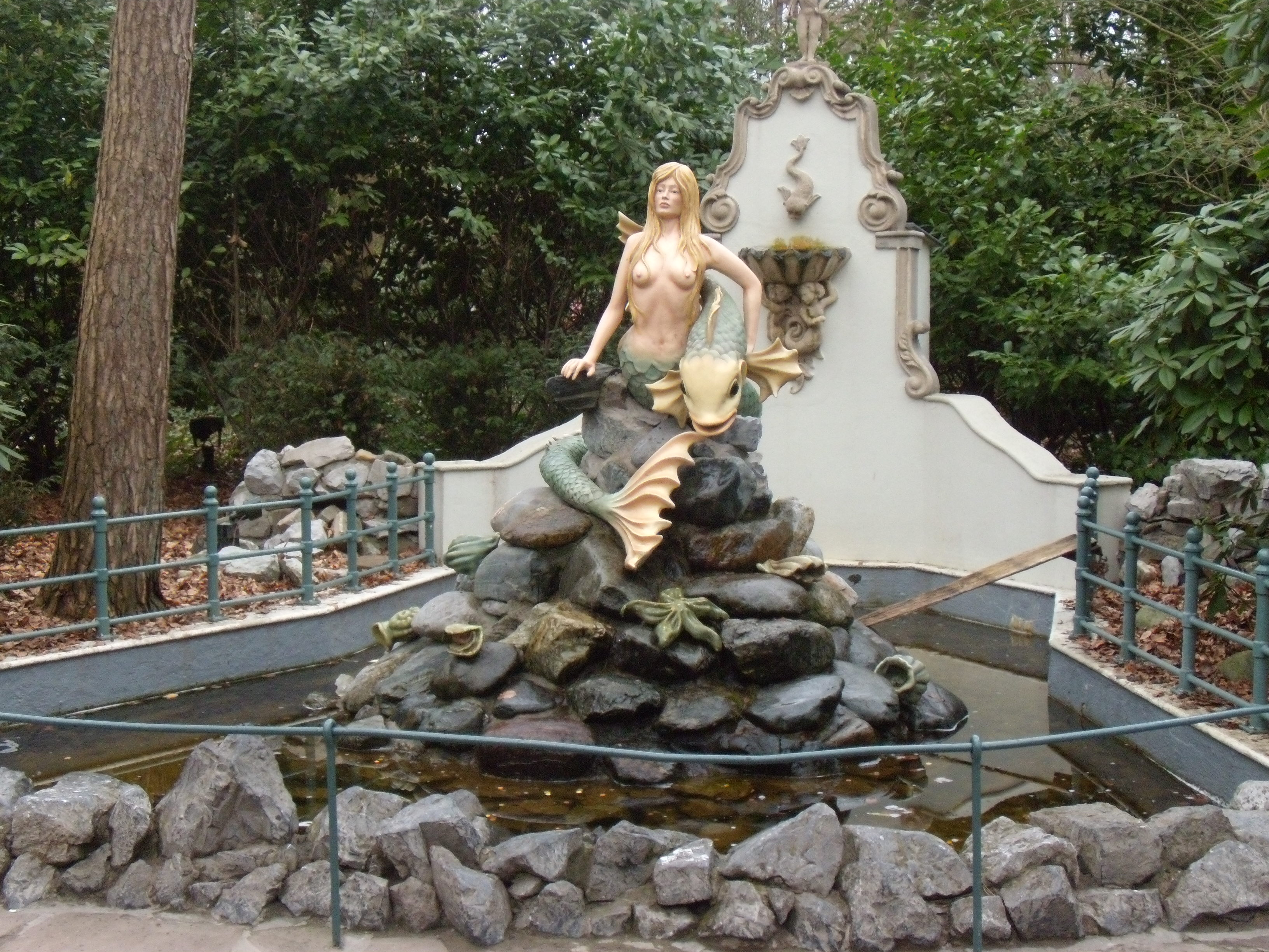 De Kleine Zeemeermin - La petite sirène représentée dans le parc d'attractions néerlandais Efteling.